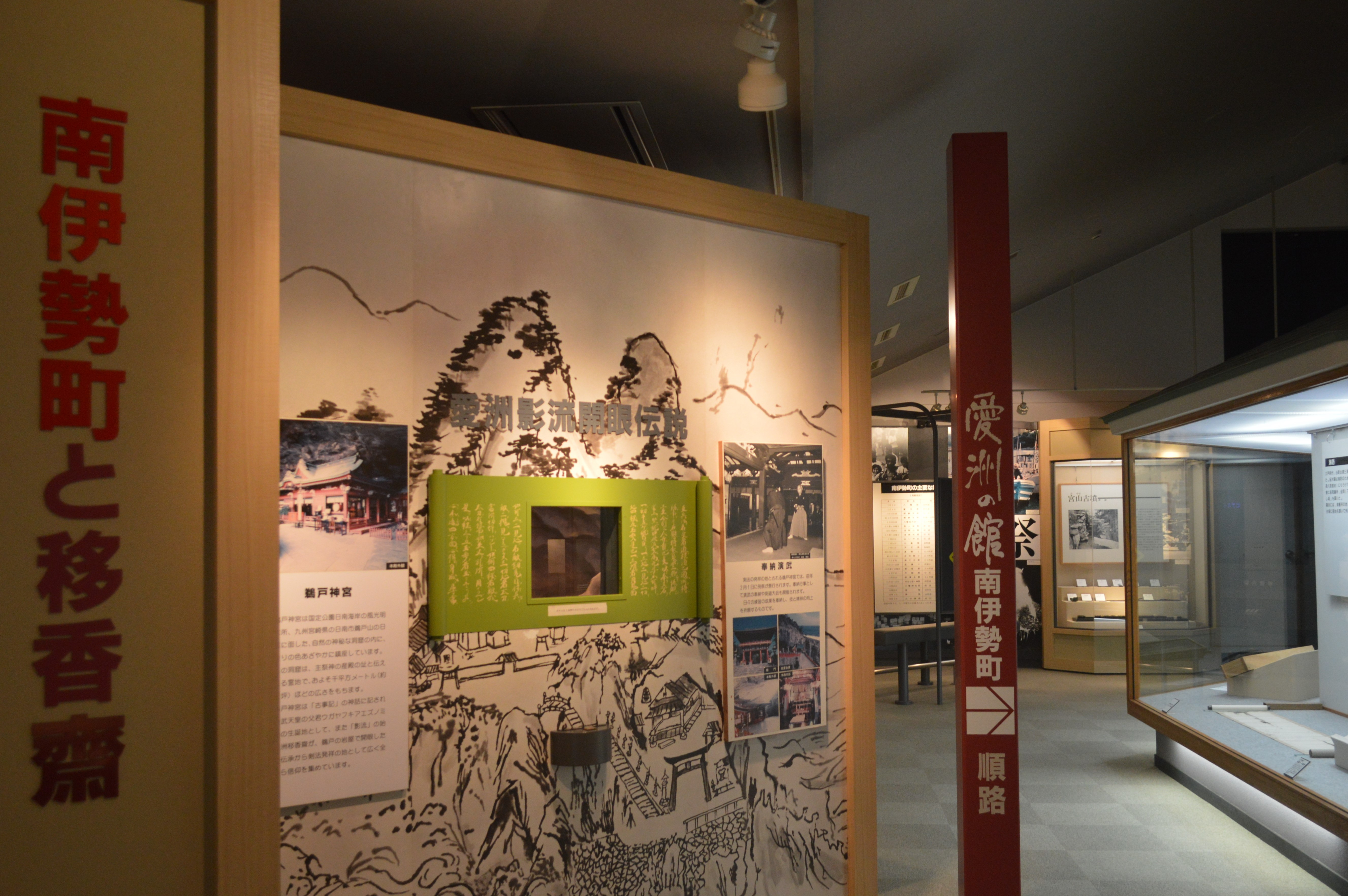 三重県度会郡南伊勢町五ヶ所浦にある愛洲の館。